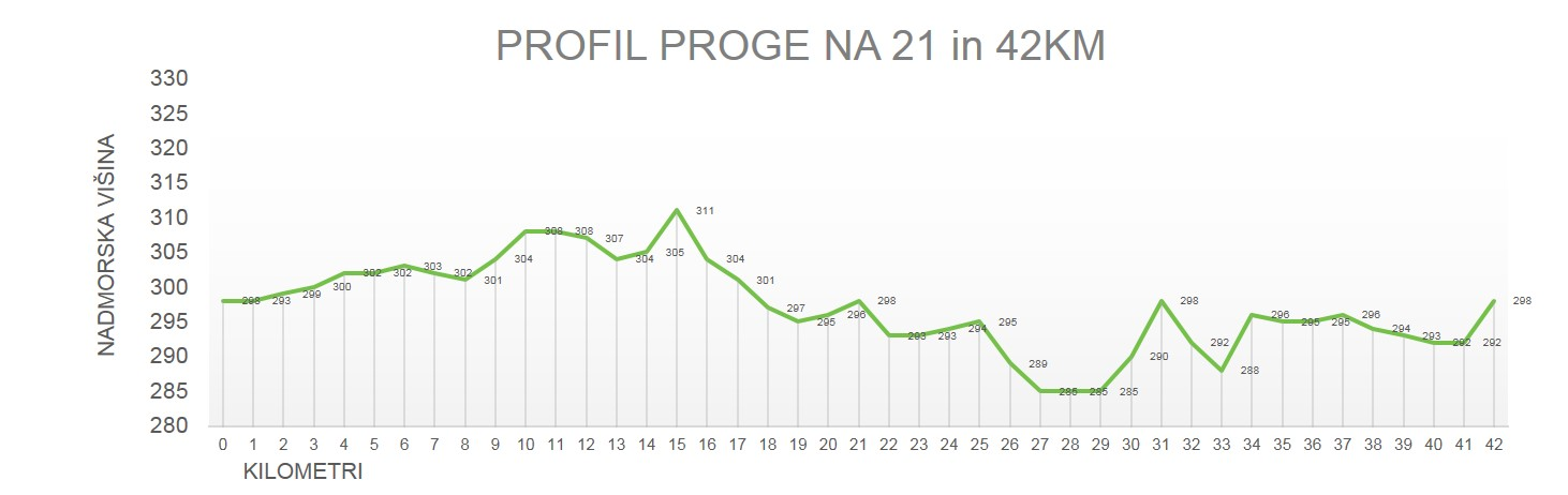 profil trase